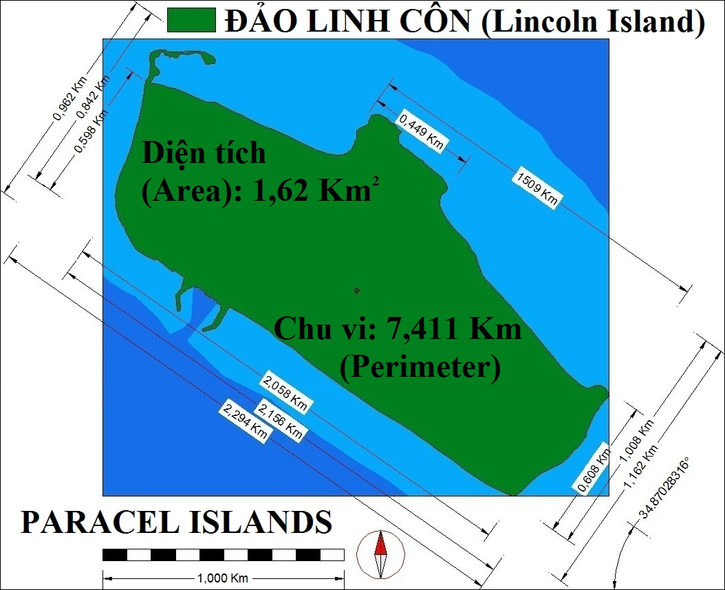 Bản đồ đảo Linh Côn (Lincoln Island) của quần đảo Hoàng Sa (Paracel Islands).